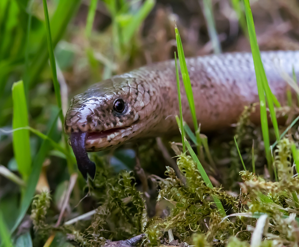 Sachsen, Kleingarten: Blindschleiche